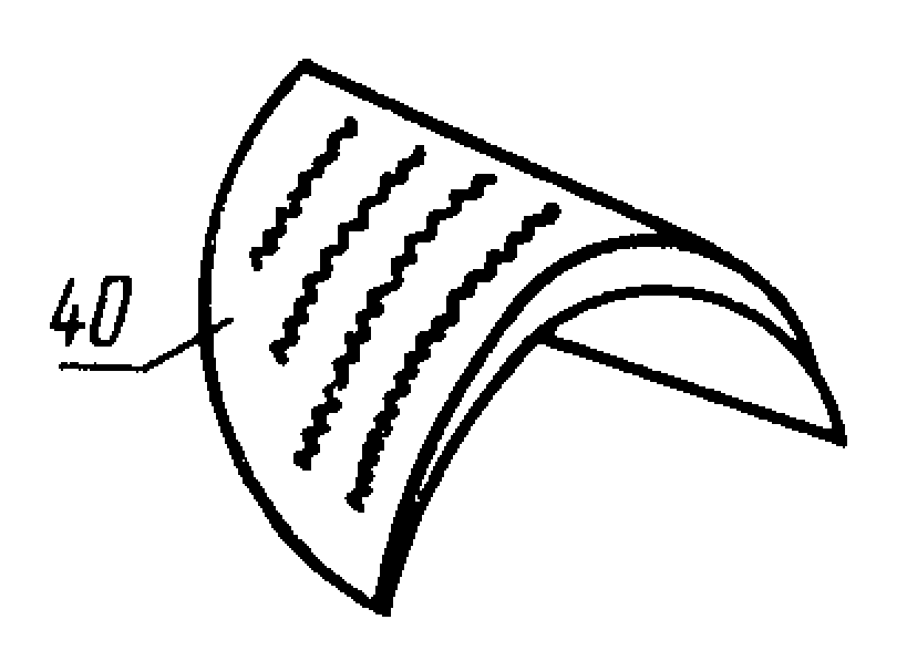 Изображение из ГОСТ 22977-89 (СТ СЭВ 6484-88) — Детали швейных изделий. Термины и определения.